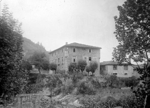 Casa-torre Gabiria, con su escudo de armas, en la escuadra principal de la fachada. Desde 2008, sede de las oficinas de Tavex Algodonera.